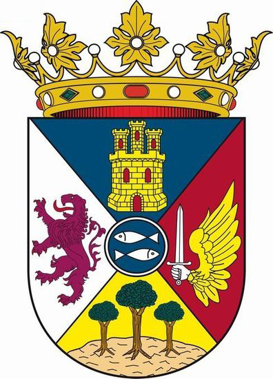 Escudo oficial de la ciudad de Villena